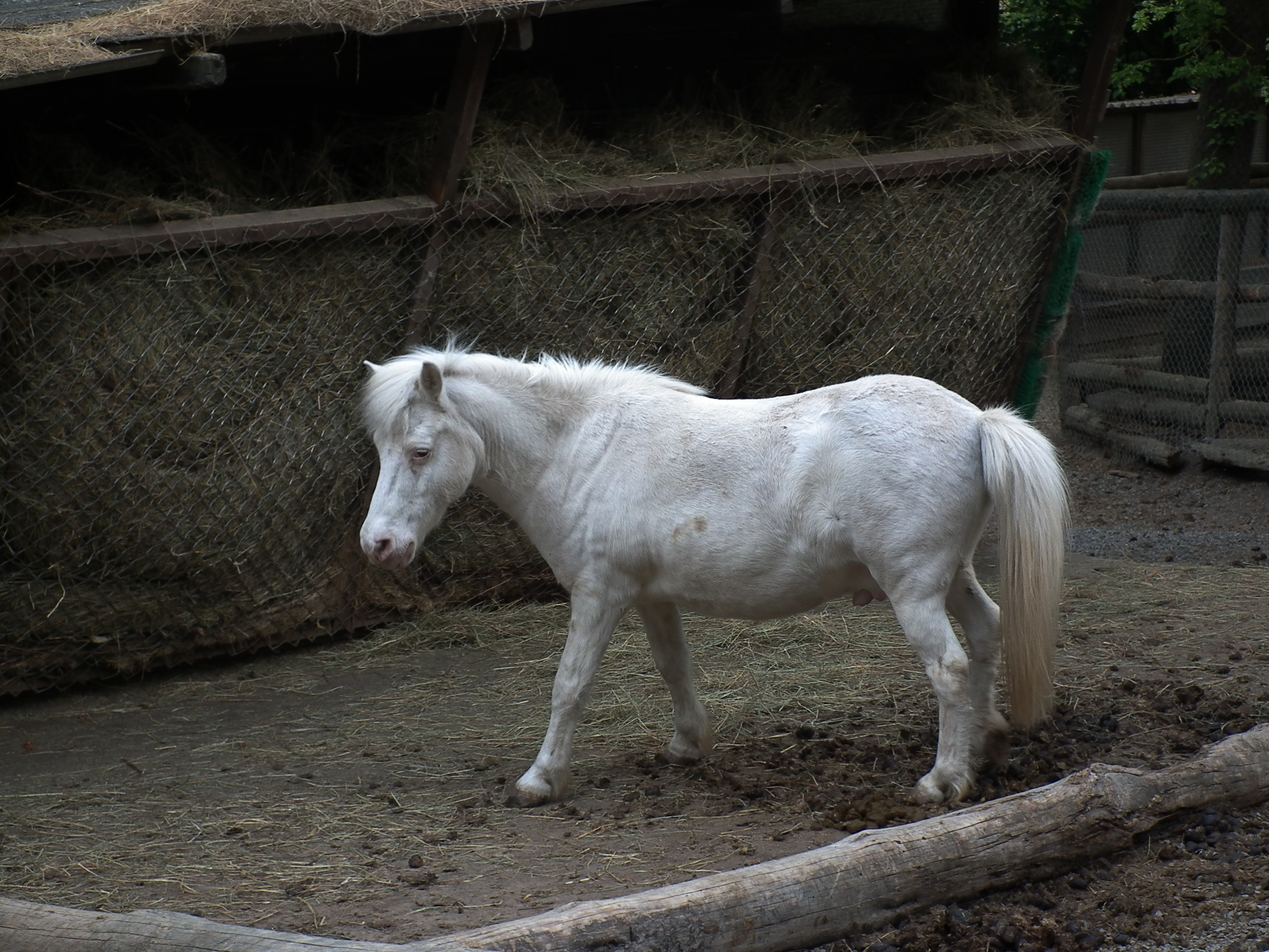 Weißes Pony im Tierpark Bretten (Baden-Württemberg, Deutschland)